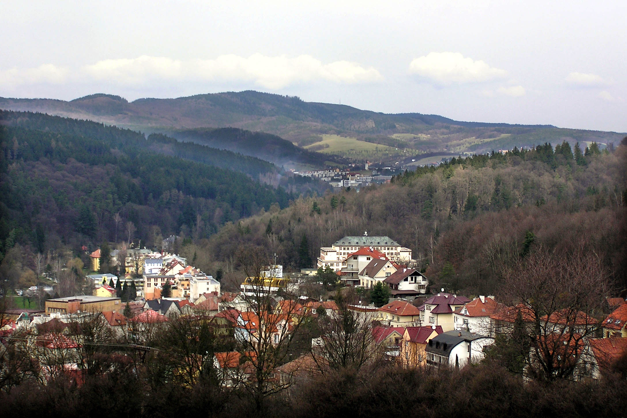 Luhačovice - celkový pohled